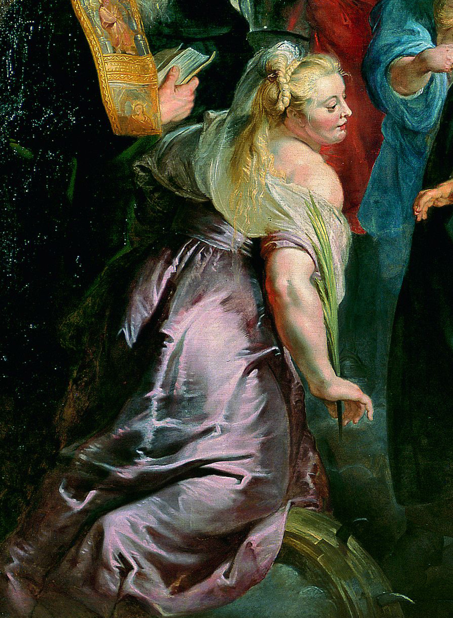 Peinture